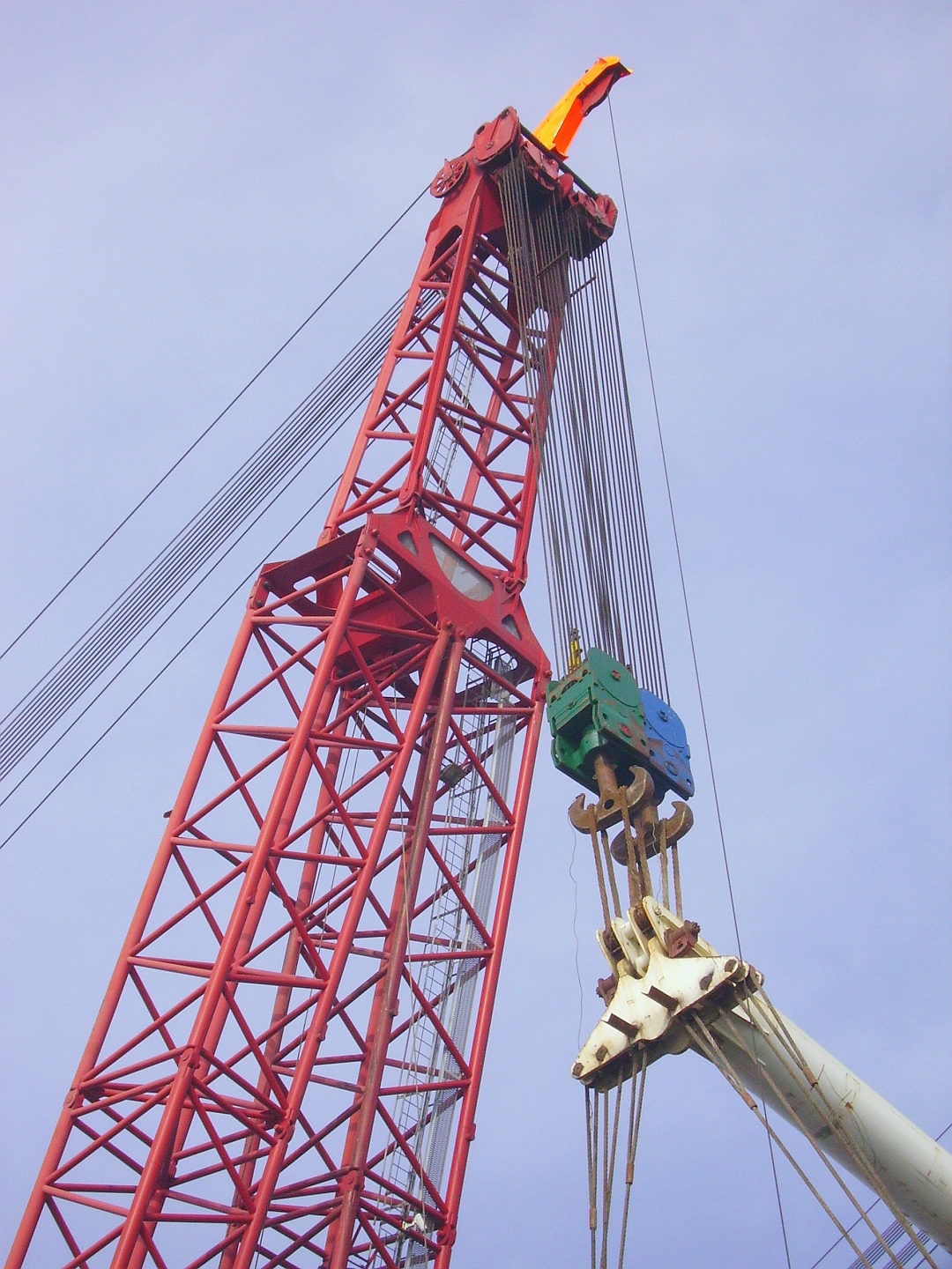 Détails de l'une des flèches de la barge-grue Rambiz, au port de La Rochelle-Pallice le 28 octobre 2007.